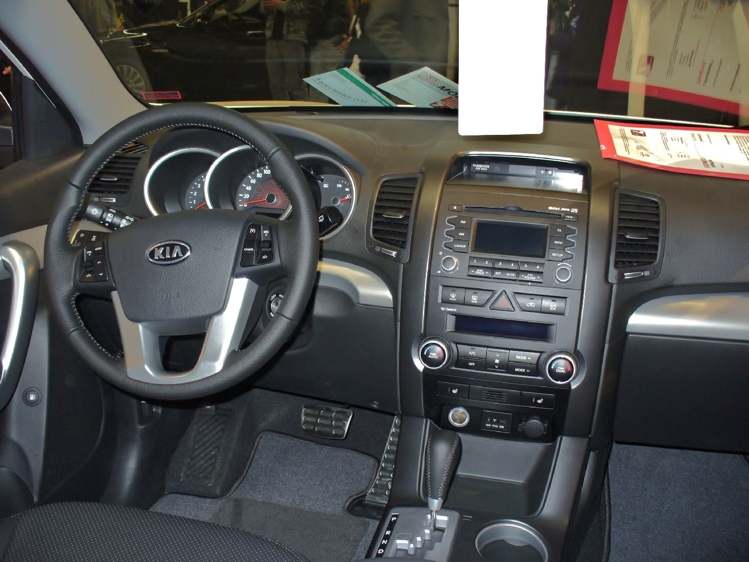 Kia Sorento